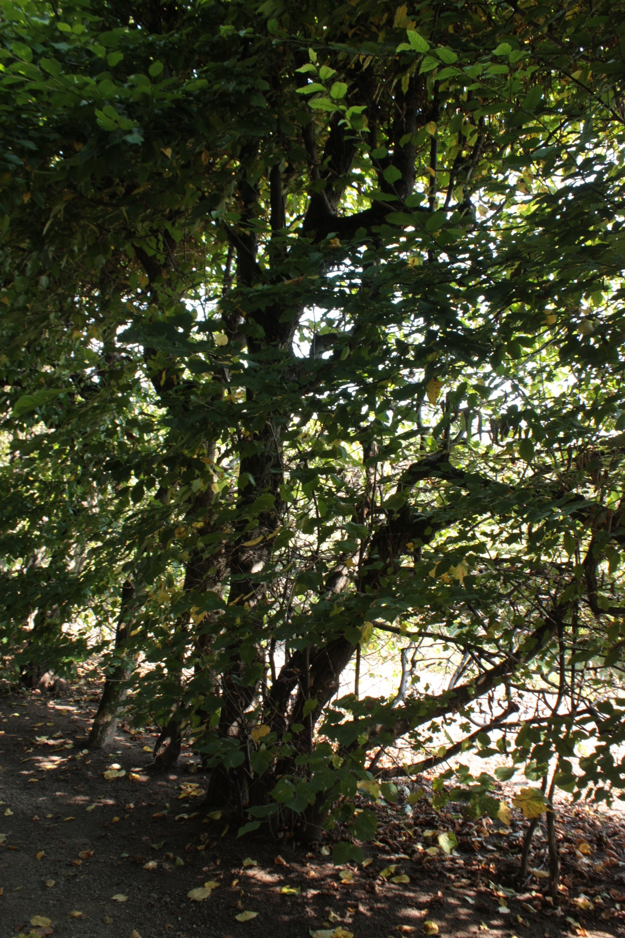 Živý plot , loubí, Kroměříž, Květná zahrada